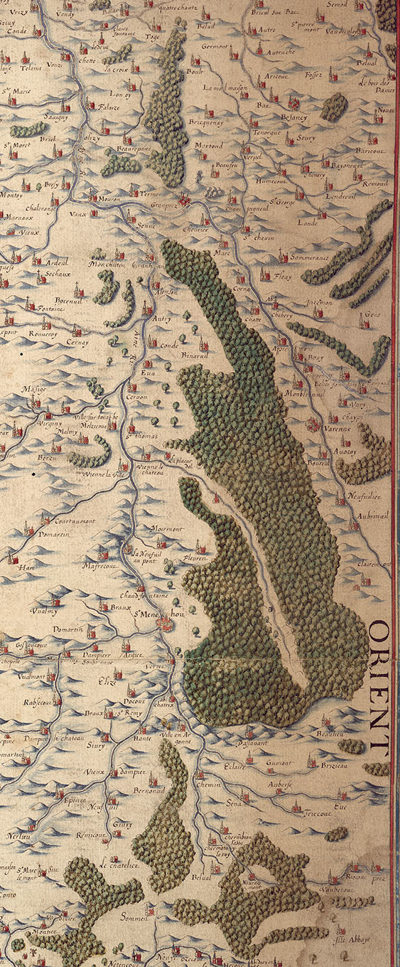 vue de chalons.